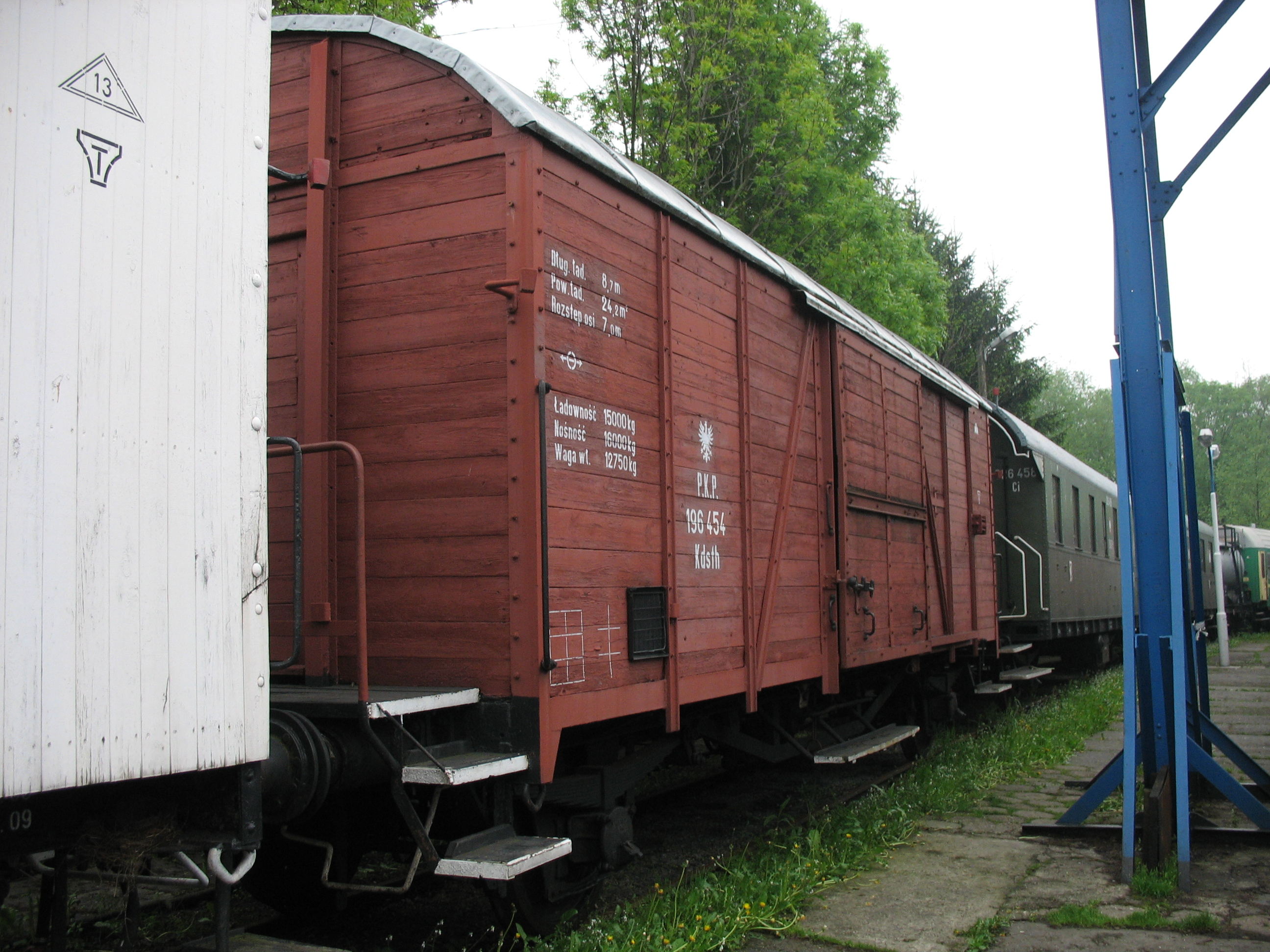 Wagon Kdsth 196 454. Eksponat skansenu taboru kolejowego w Chabówce